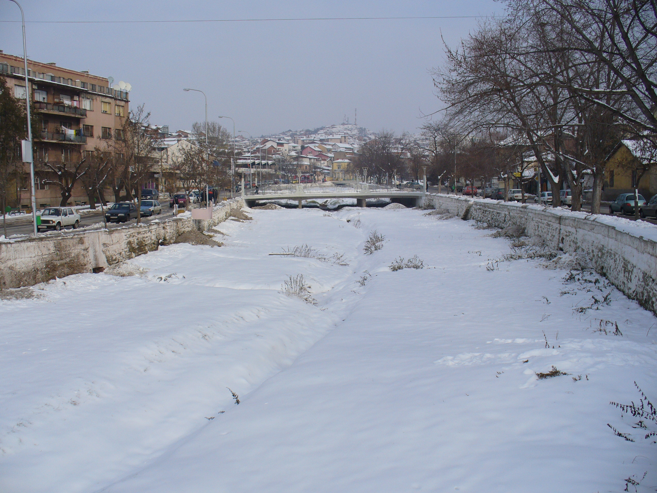 Štip, MAcedonia